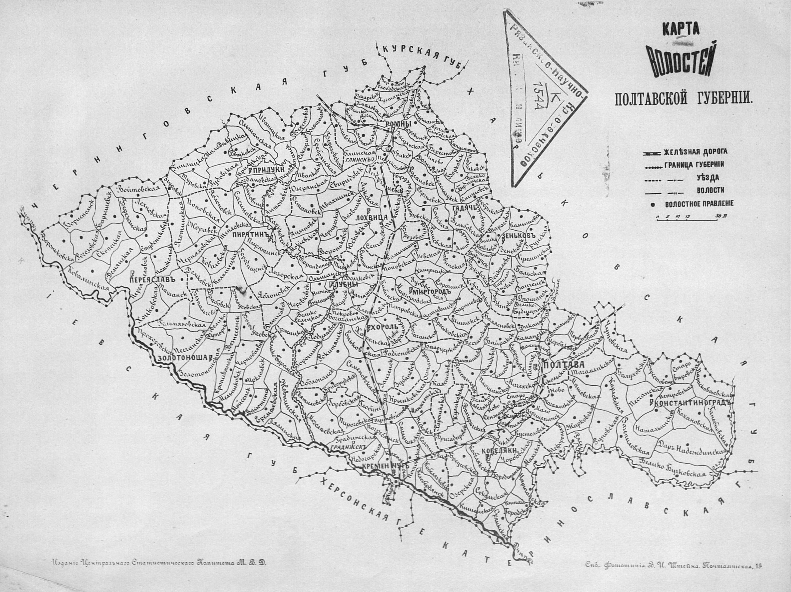 Карта волостей Полтавской губернии